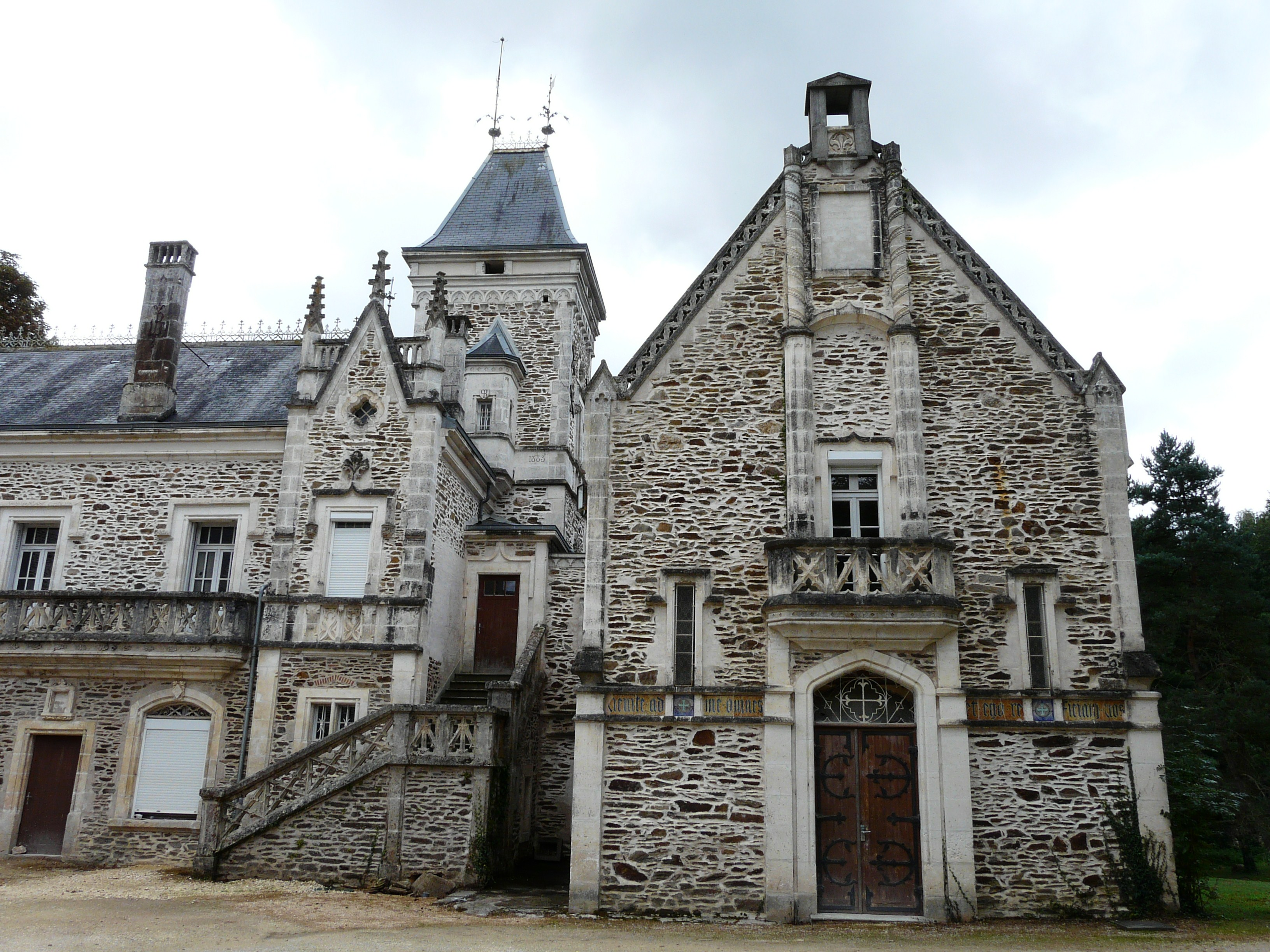 La chapelle du château d'Oche, Saint-Priest-les-Fougères, Dordogne, France